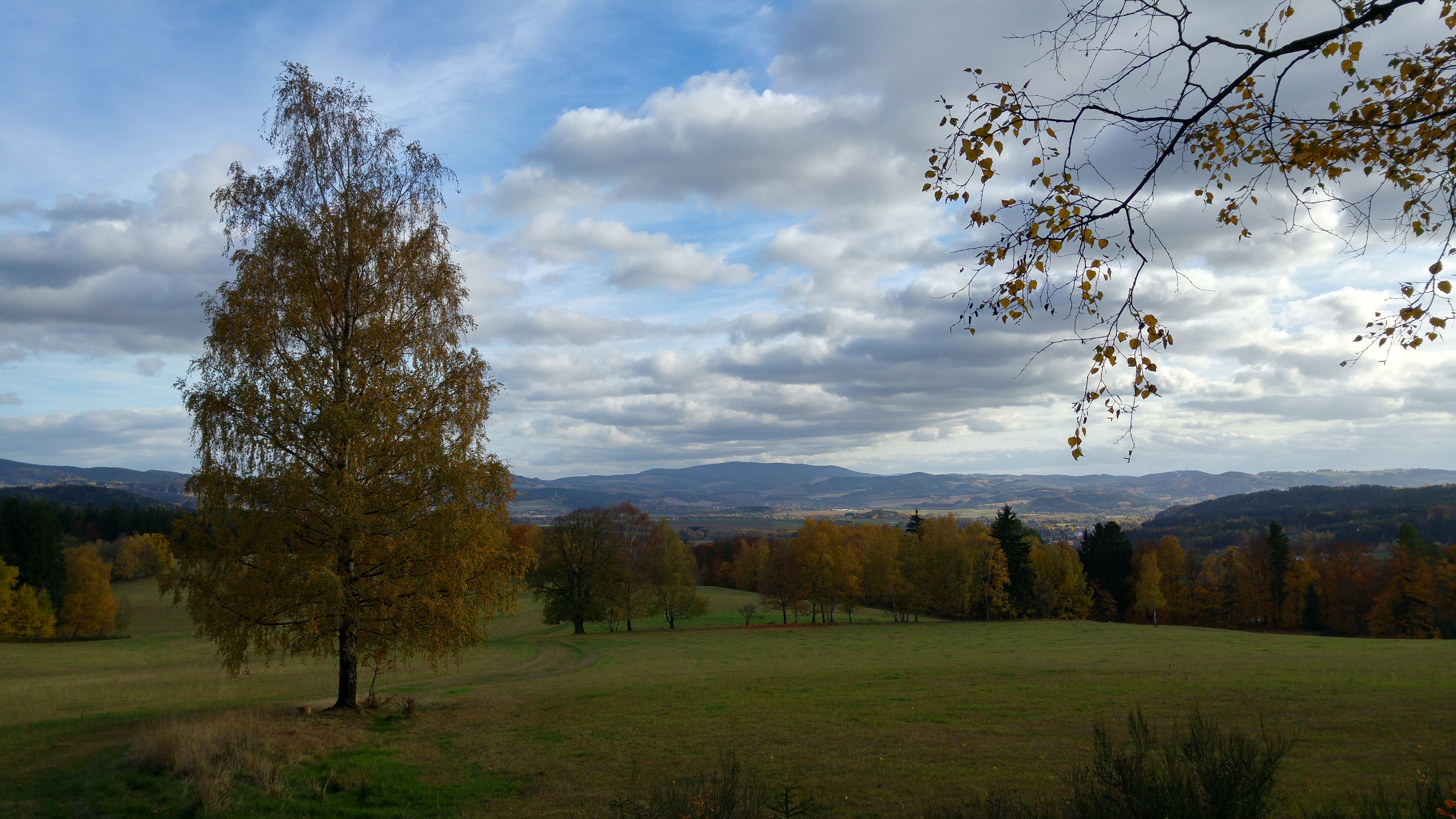 Hronovská kotlina, v pozadí Vrchmezí